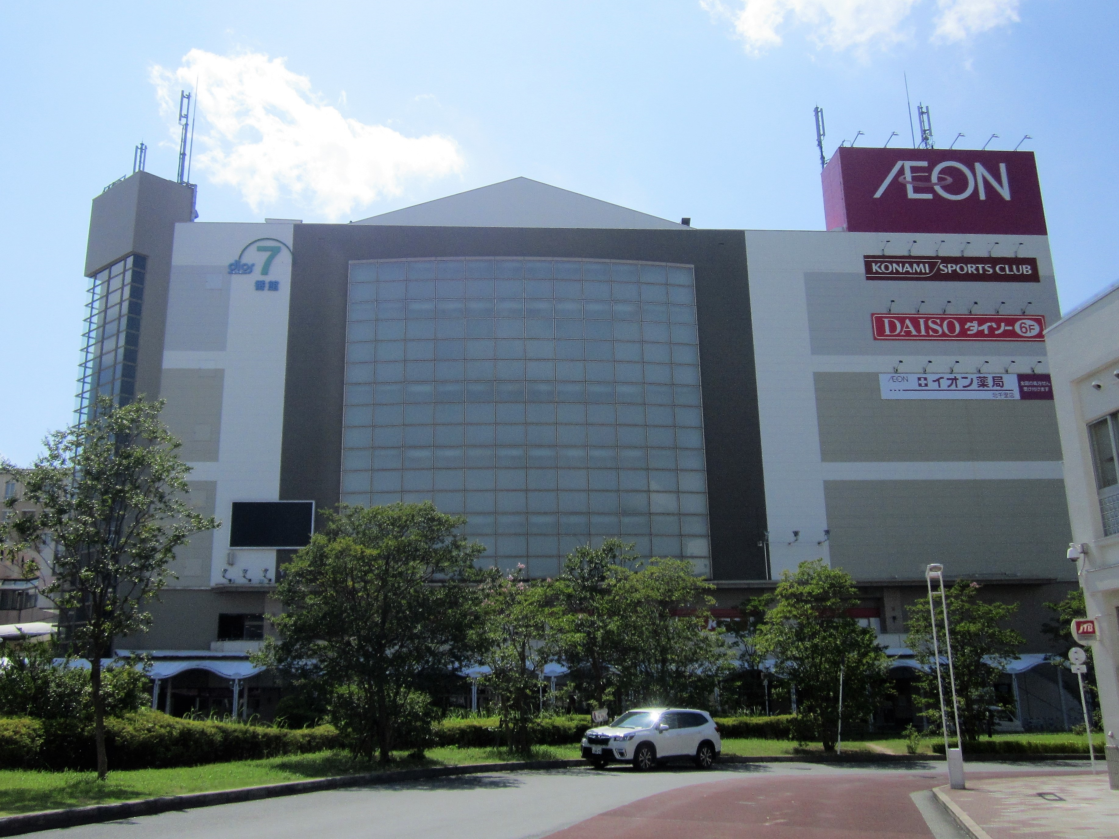 イオン北千里店